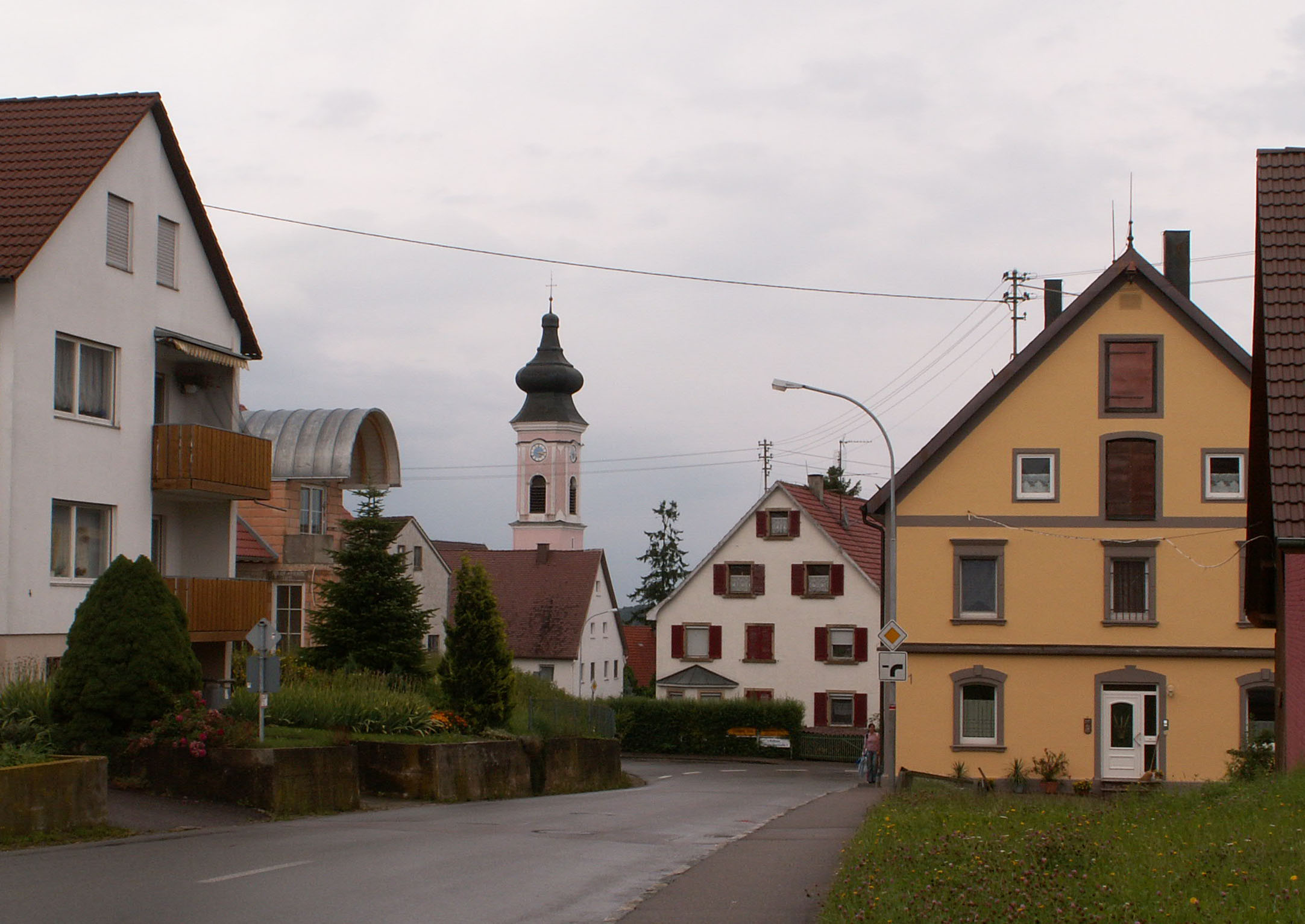 Höhenstr. in Untergriesingen, Griesingen